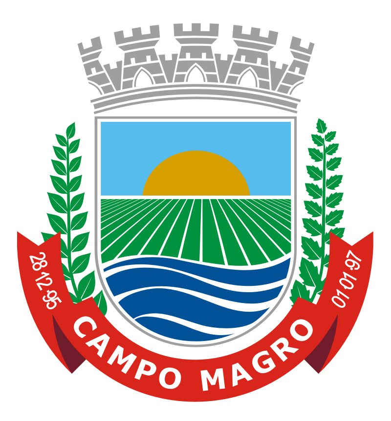 Brasão do Município de Campo Magro/PR